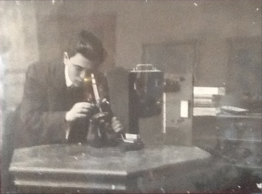 Professore Antonio Gasbarrini all' età di 27 anni guarda al microscopio Golgi premio nobel